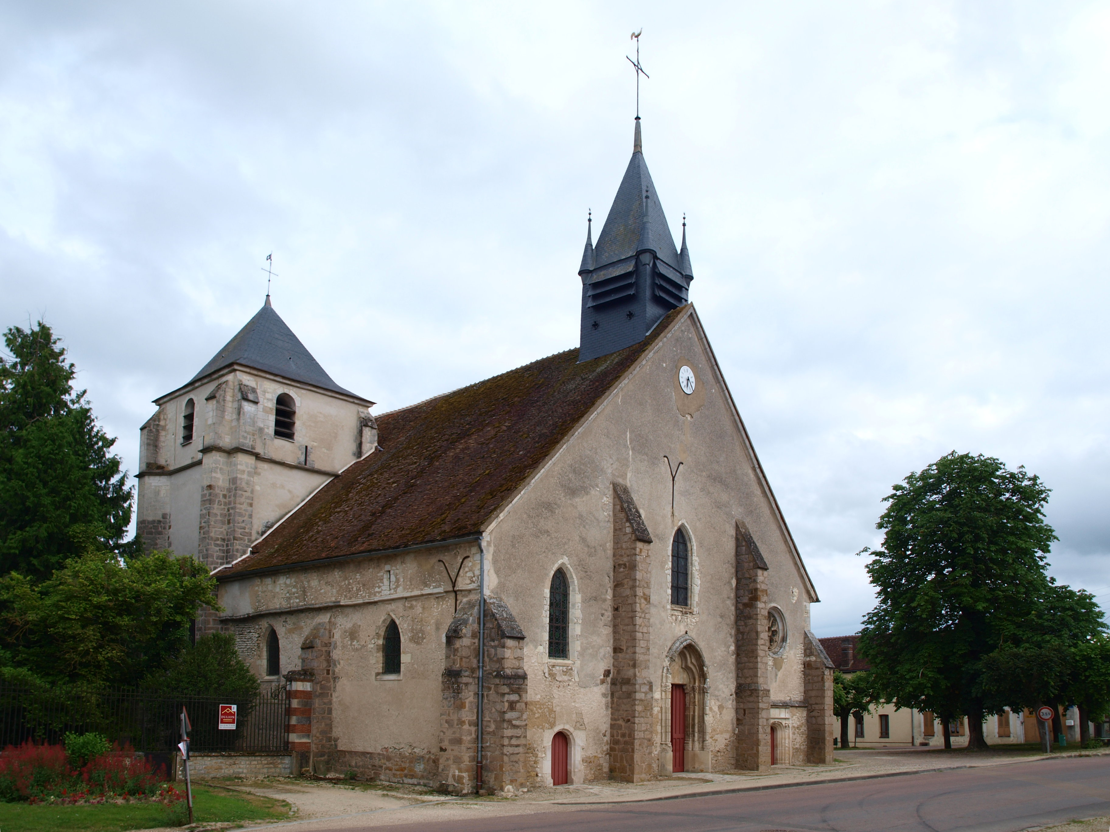 Neuilly (Yonne, France) ; l'église.